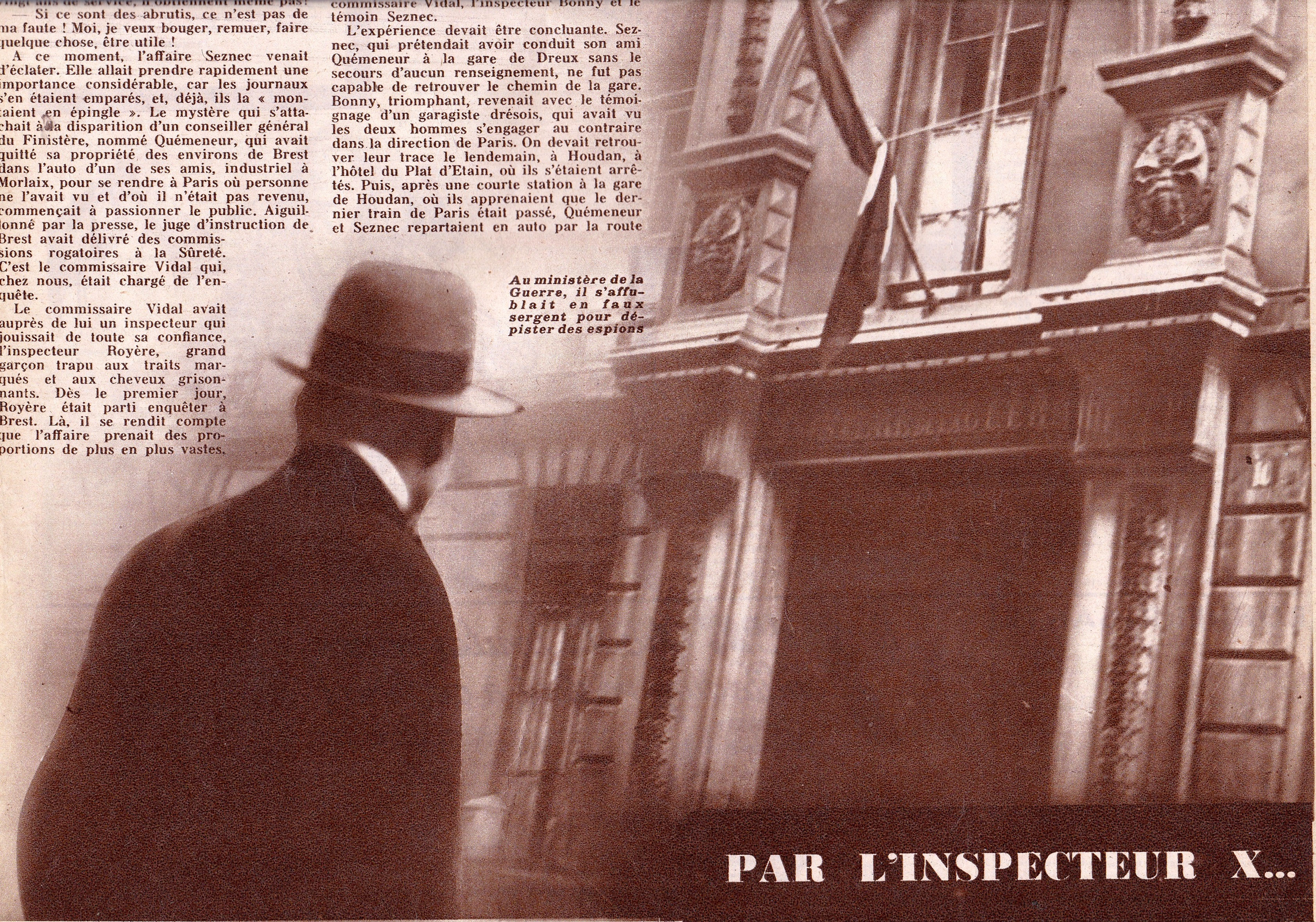 La silhouette fictive de Bonny lors d'une mission secrète au ministère de la guerre remontant aux années vingt illustre une double page du magazine Détective du 13 décembre 1934. Légende : au ministère de la guerre, il s'affublait en faux sergent pour débusquer des espions.